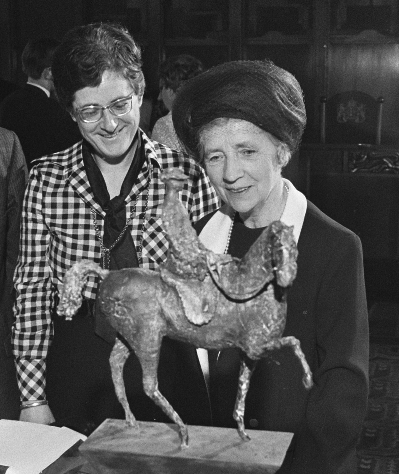 Stichting Comite Standbeeld Koningin Wilhelmina biedt burgemeester Samkalden een maquette aan van ruiterstandbeeld Koningin Wilhelmina op stadhuis